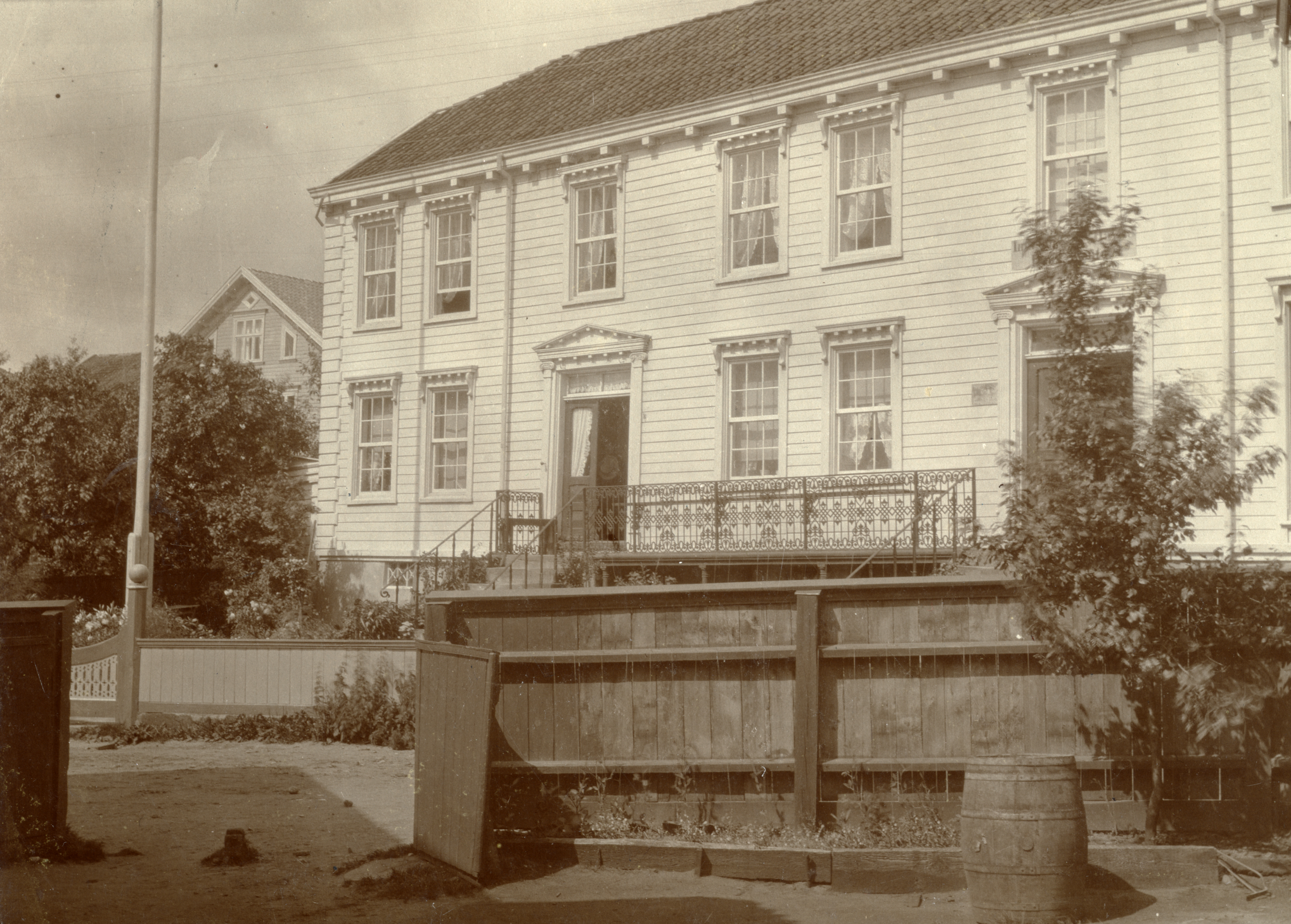 Carl Knudsens gård, Grøgårdsgården i Lillesand, Aust-Agder This image on crowdsourcing geotagging platform Fotodugnad